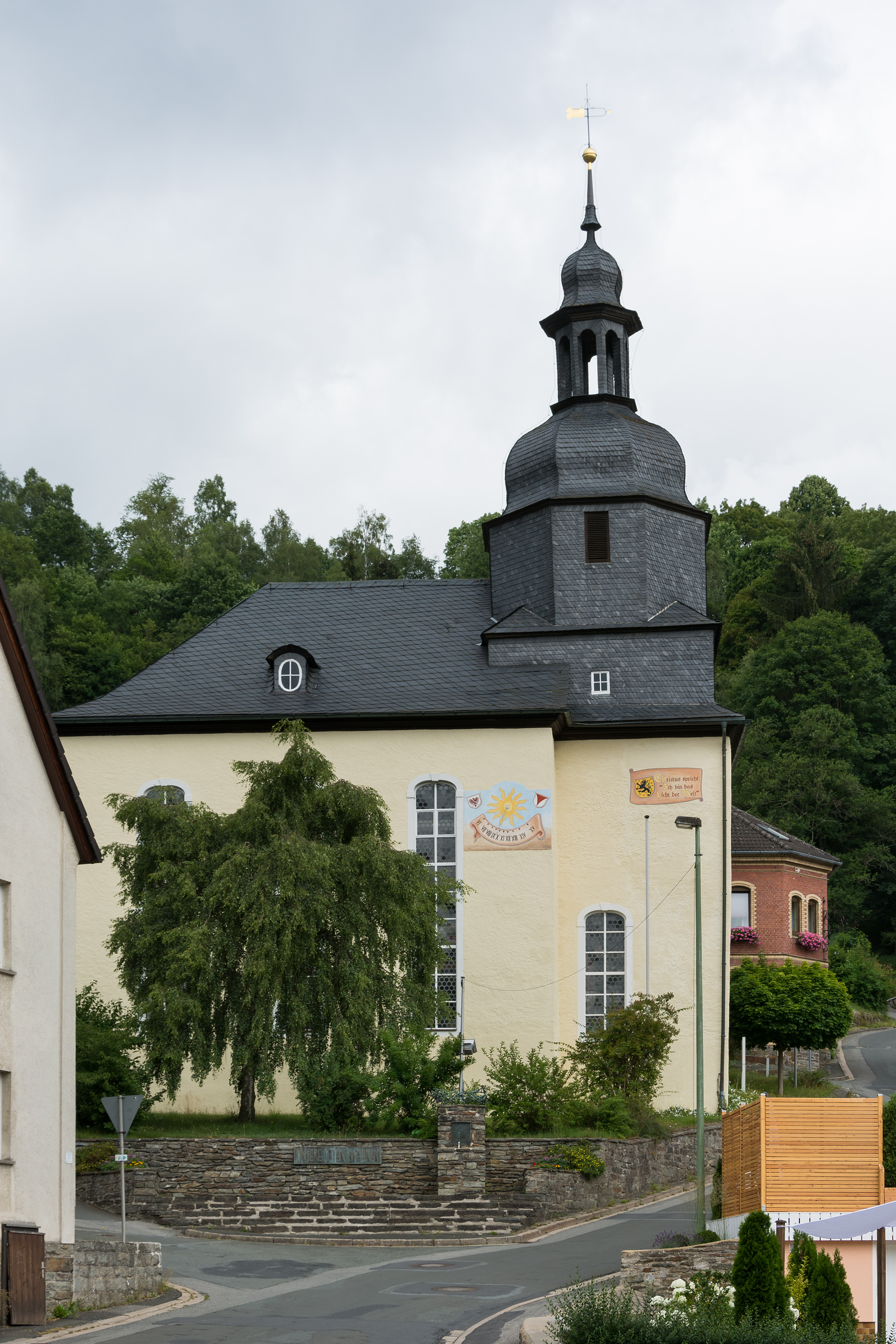 Evangelisch-Lutherische Kirche St. Nikolaus im Ortsteil Lauenstein der oberfränkischen Stadt Ludwigsstadt.